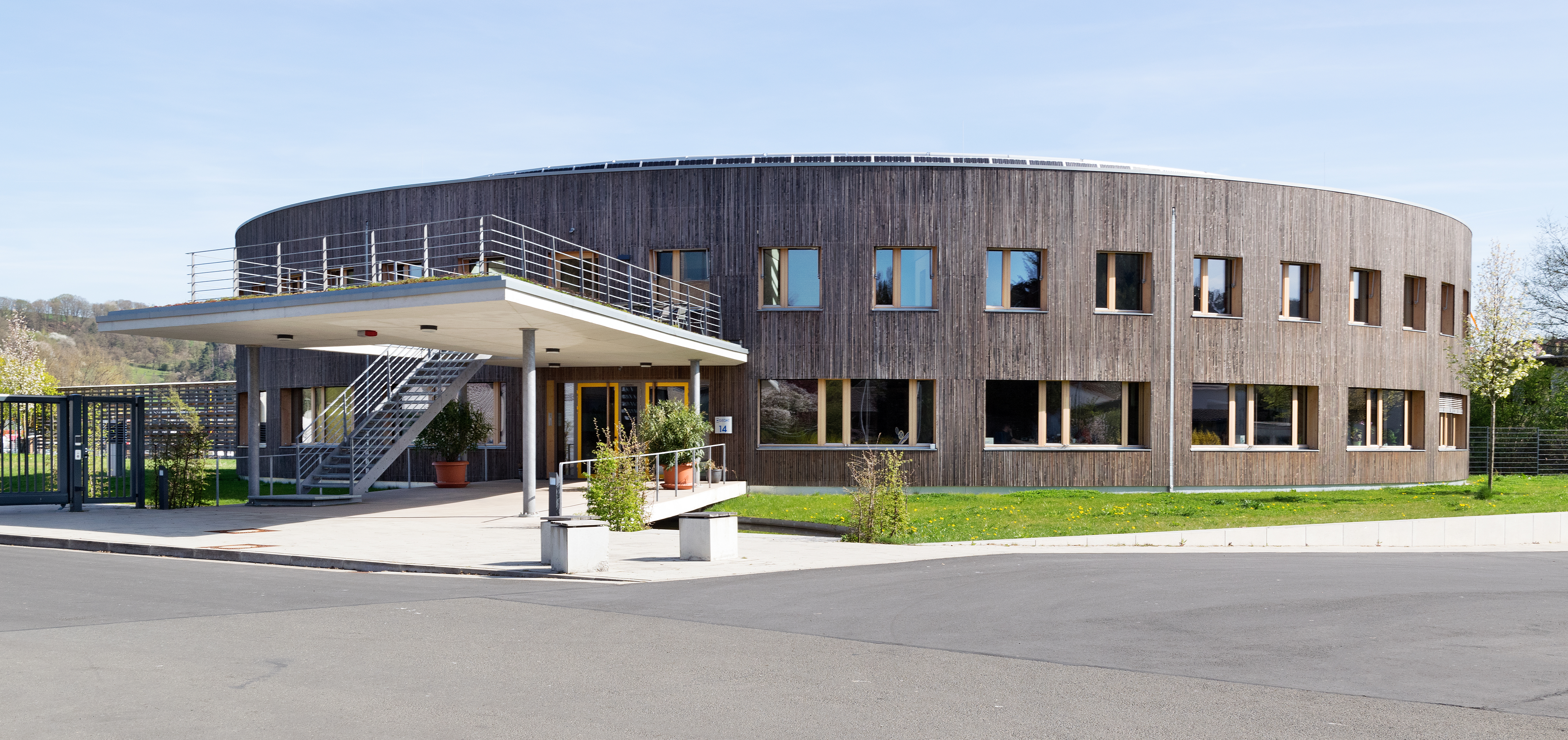 Das "Sonnenforum" in der Lahnstraße in Cölbe